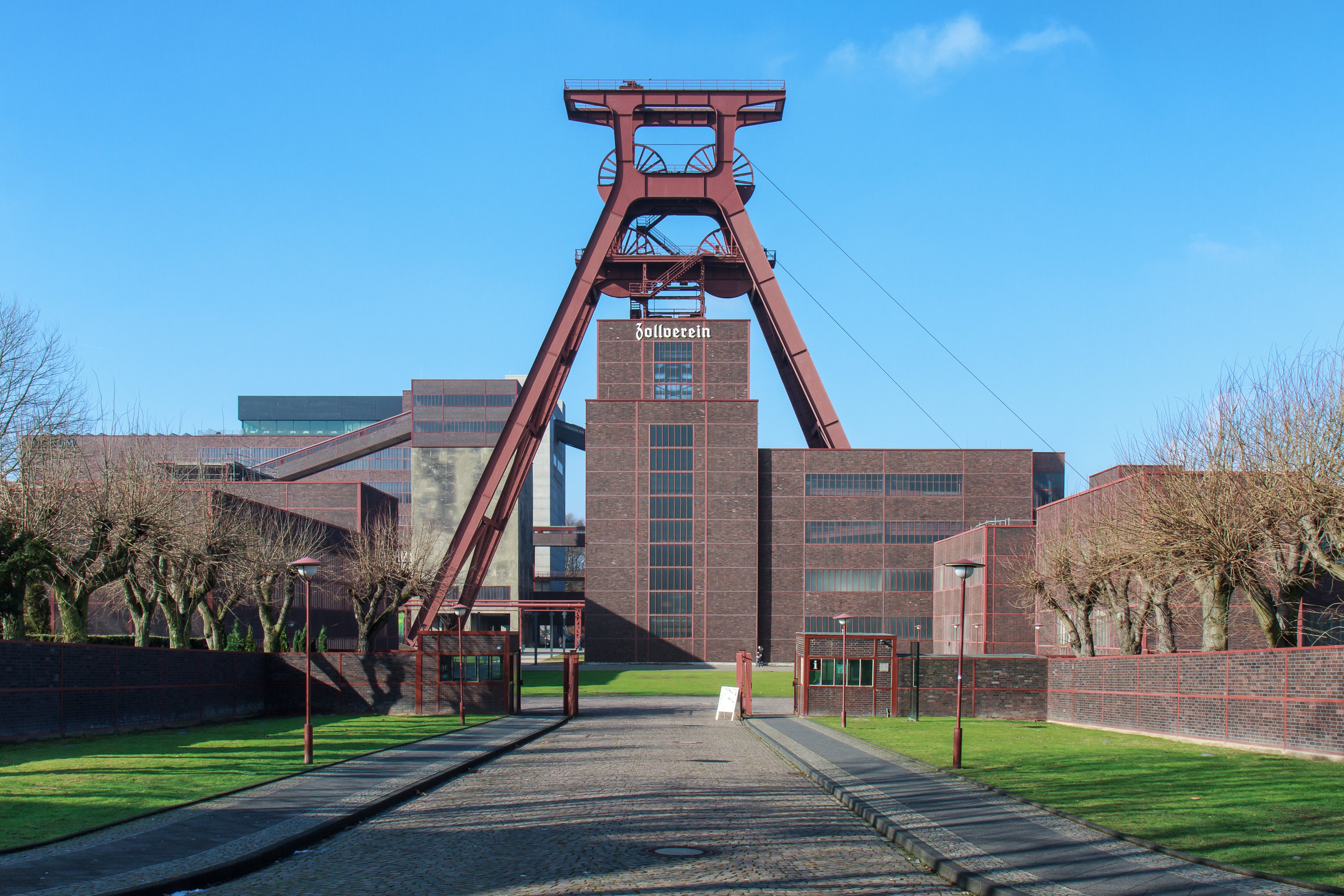 Essen - Zeche-Zollverein - Eingangstor - 2013